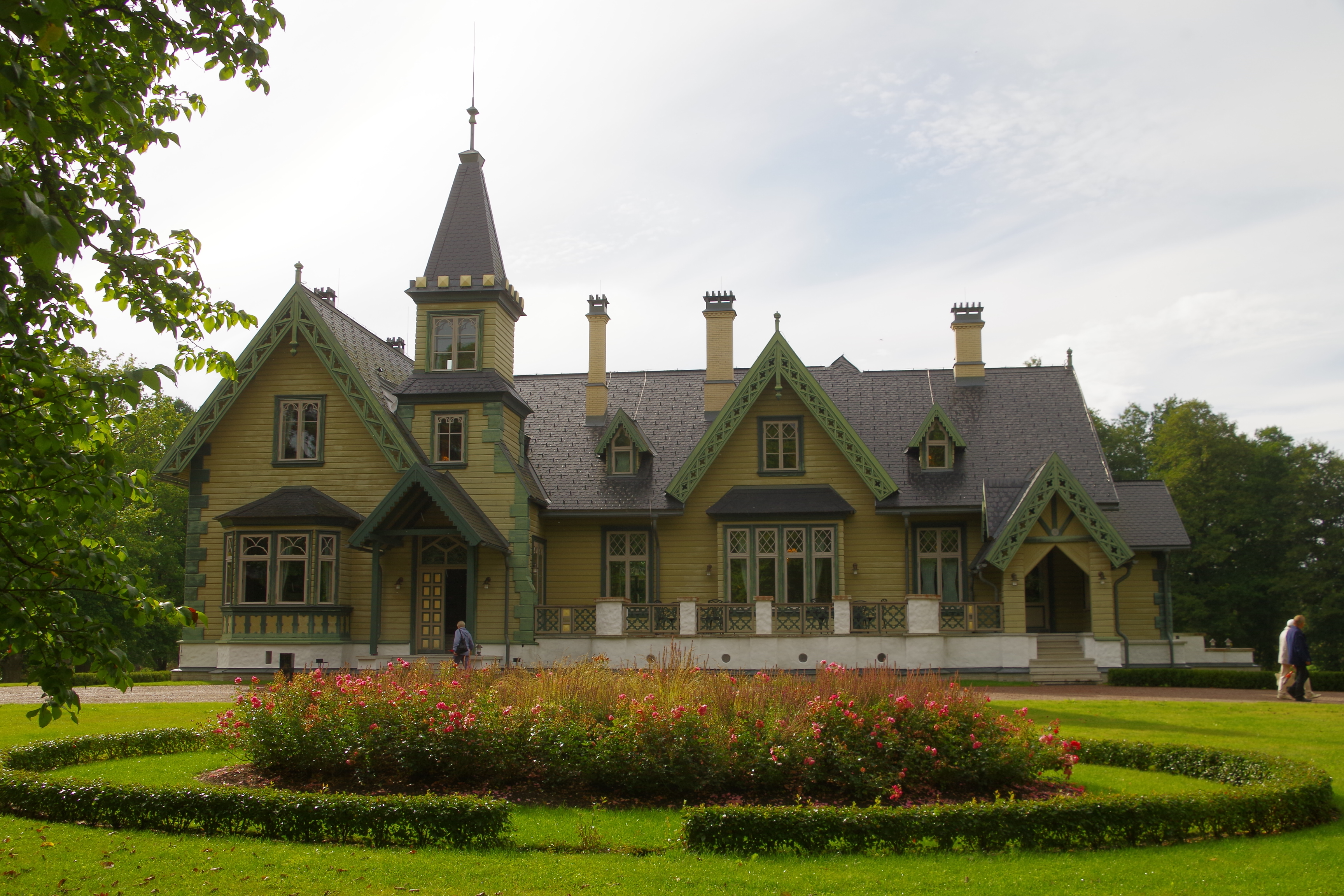 Kõltsu mõisa peahoone 19.-20.saj.